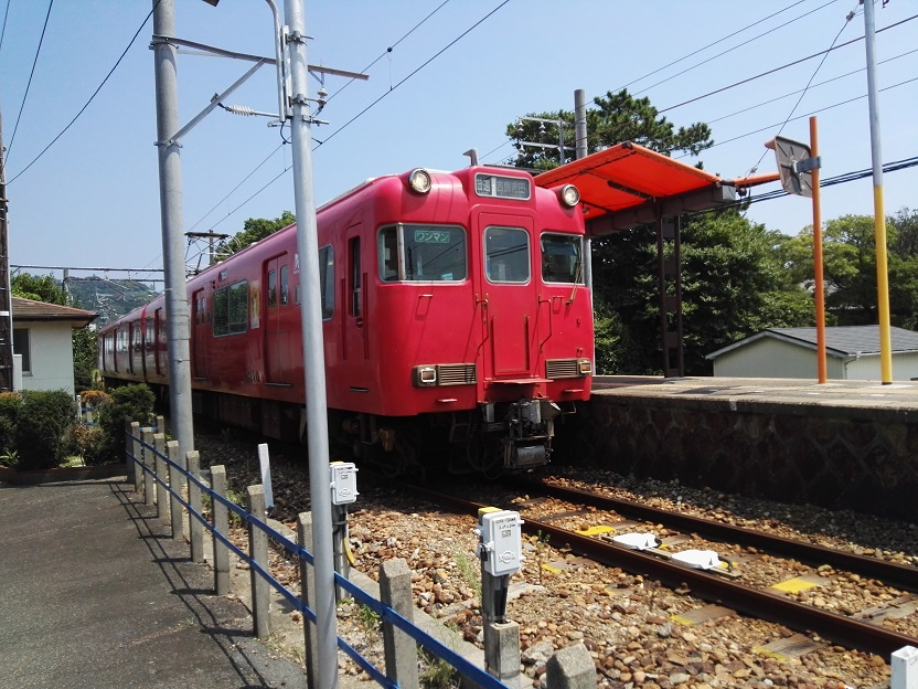 A train stops at Higashi Hazu station.